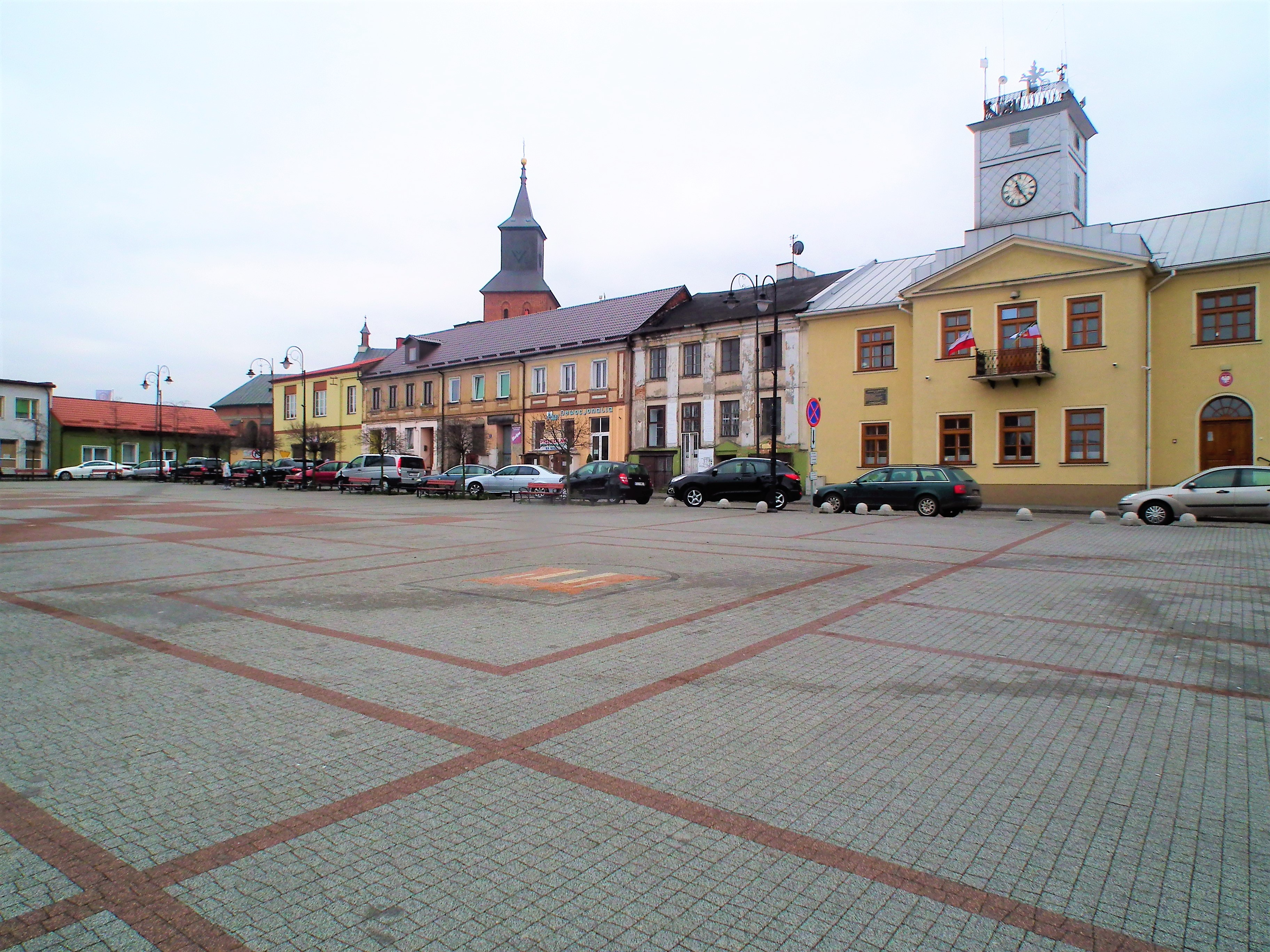 Rynek w Lipnie.